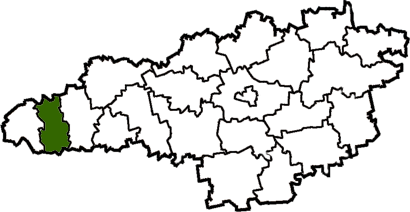 Ulyanivskyi-Raion map